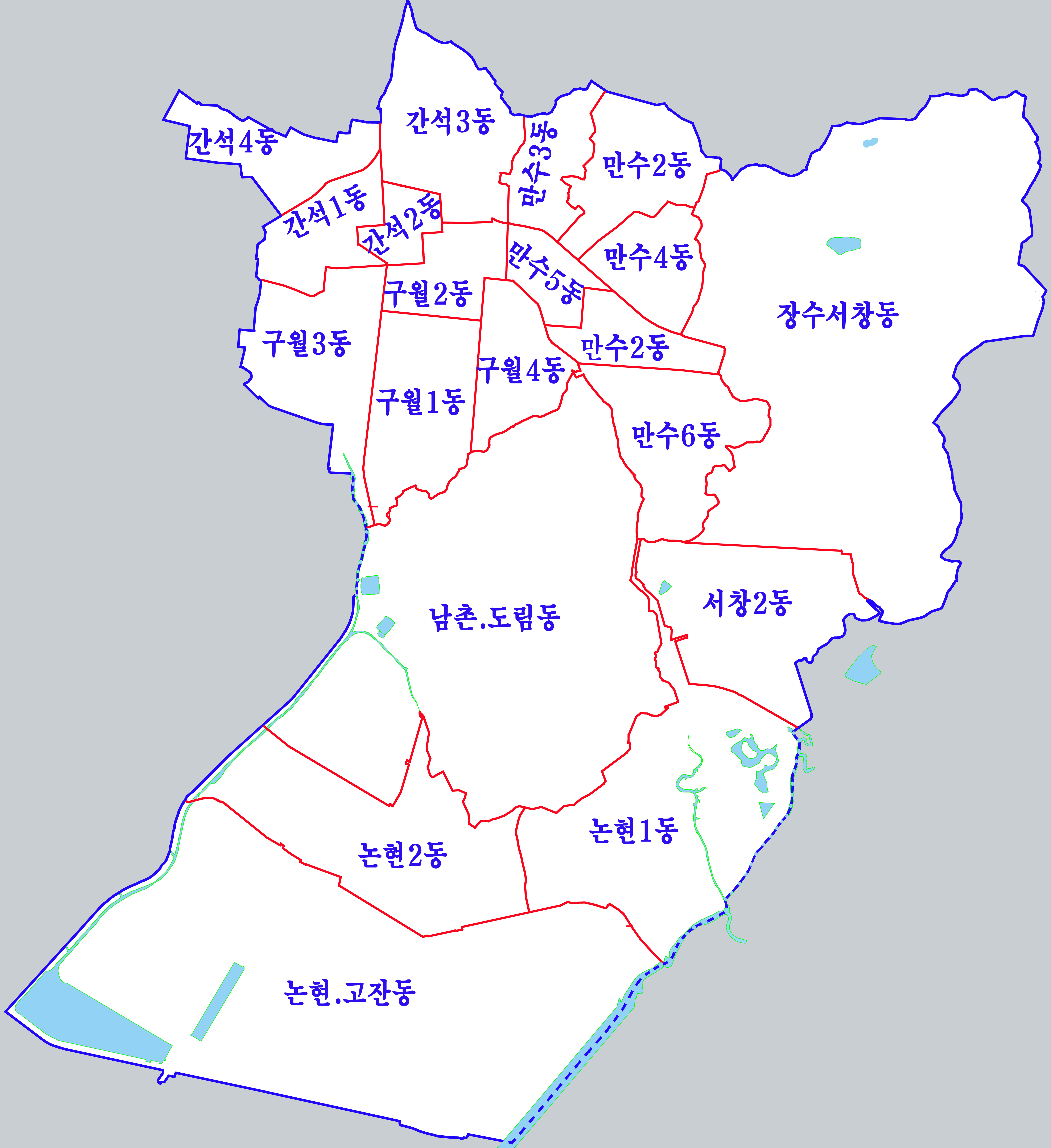 남동구지도